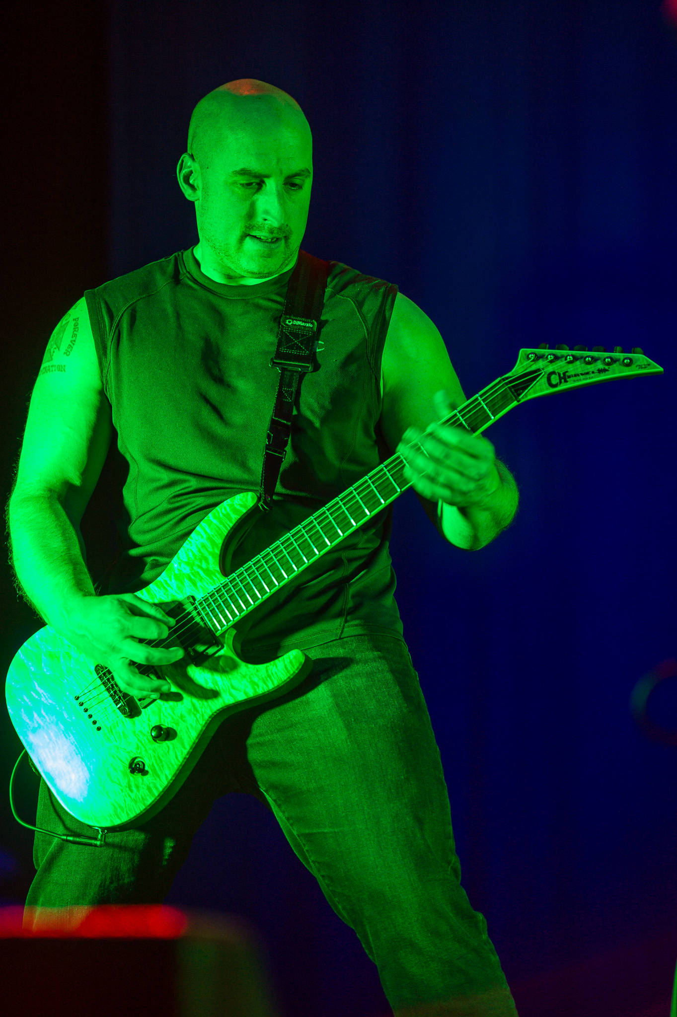 ARGO-Konzerte,All That Remains,Alternarena,Arena Nürnberger Versicherungen,Festival,Konzert,Livekonzert,Livemusik,Mike Martin,Musik,RiP,Rock im Park 2015